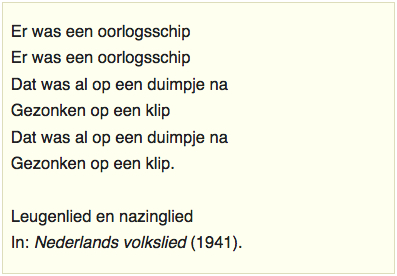 Volksliedje 'Er was een oorlogsschip', liedtekst. Tekst is opgenomen in Pollmann en Tiggers (1941). Oudste vindplaatsen rond 1880.